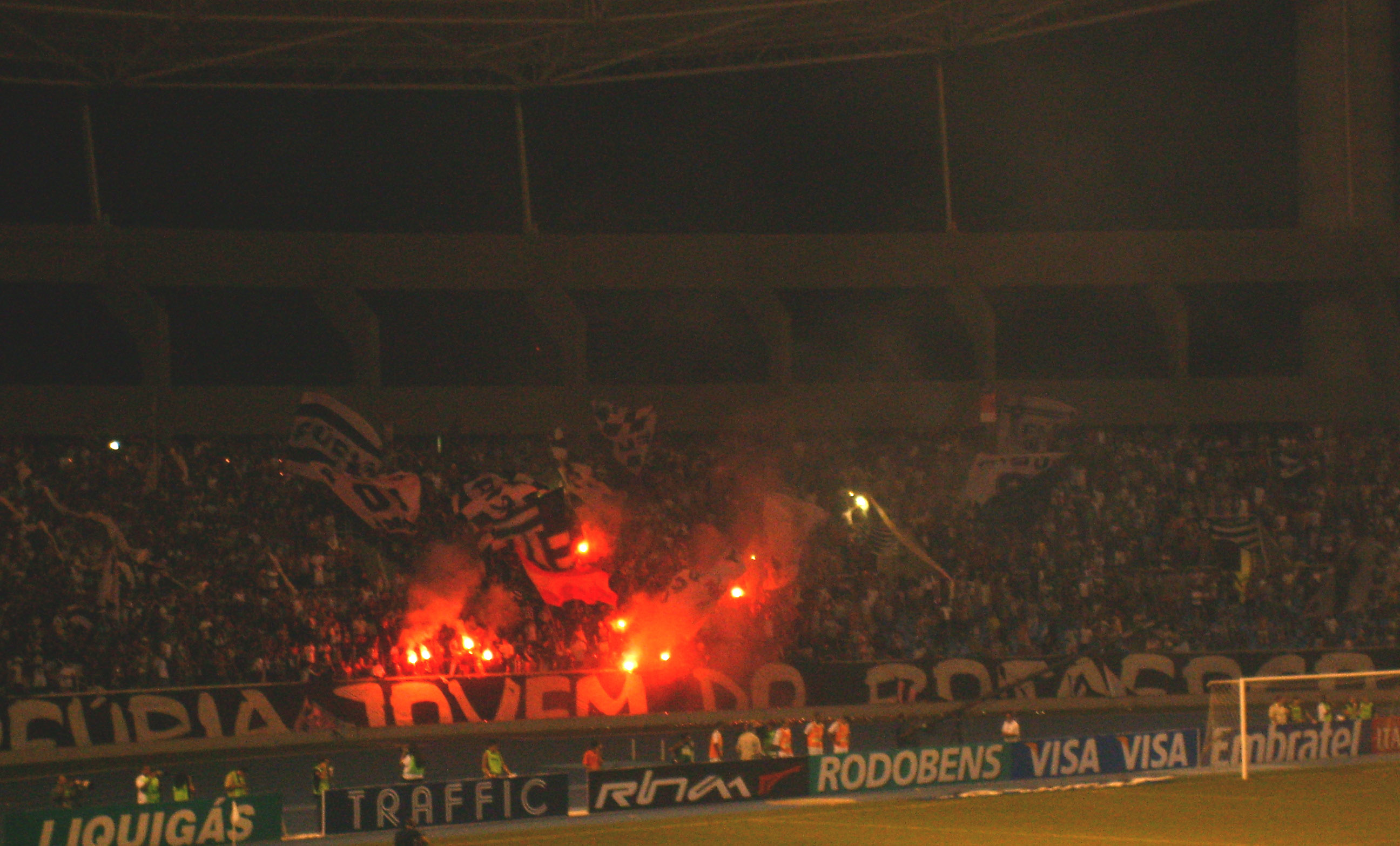 Fúria Jovem do Botafogo, torcida organizada, apóia o Botafogo FR na partida contra o Corinthians, válida pelo primeiro jogo semifinal da Copa do Brasil de 2008, em 20 de maio deste ano, no Engenhão.